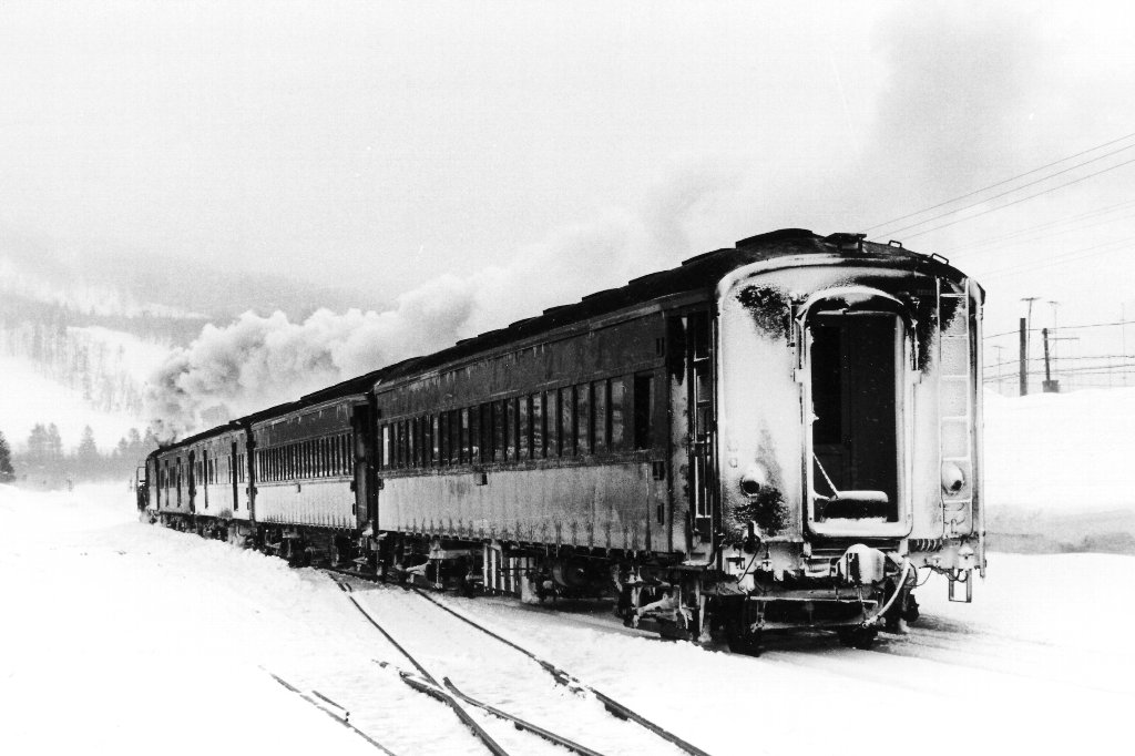 国鉄スハ32系客車スハフ32形